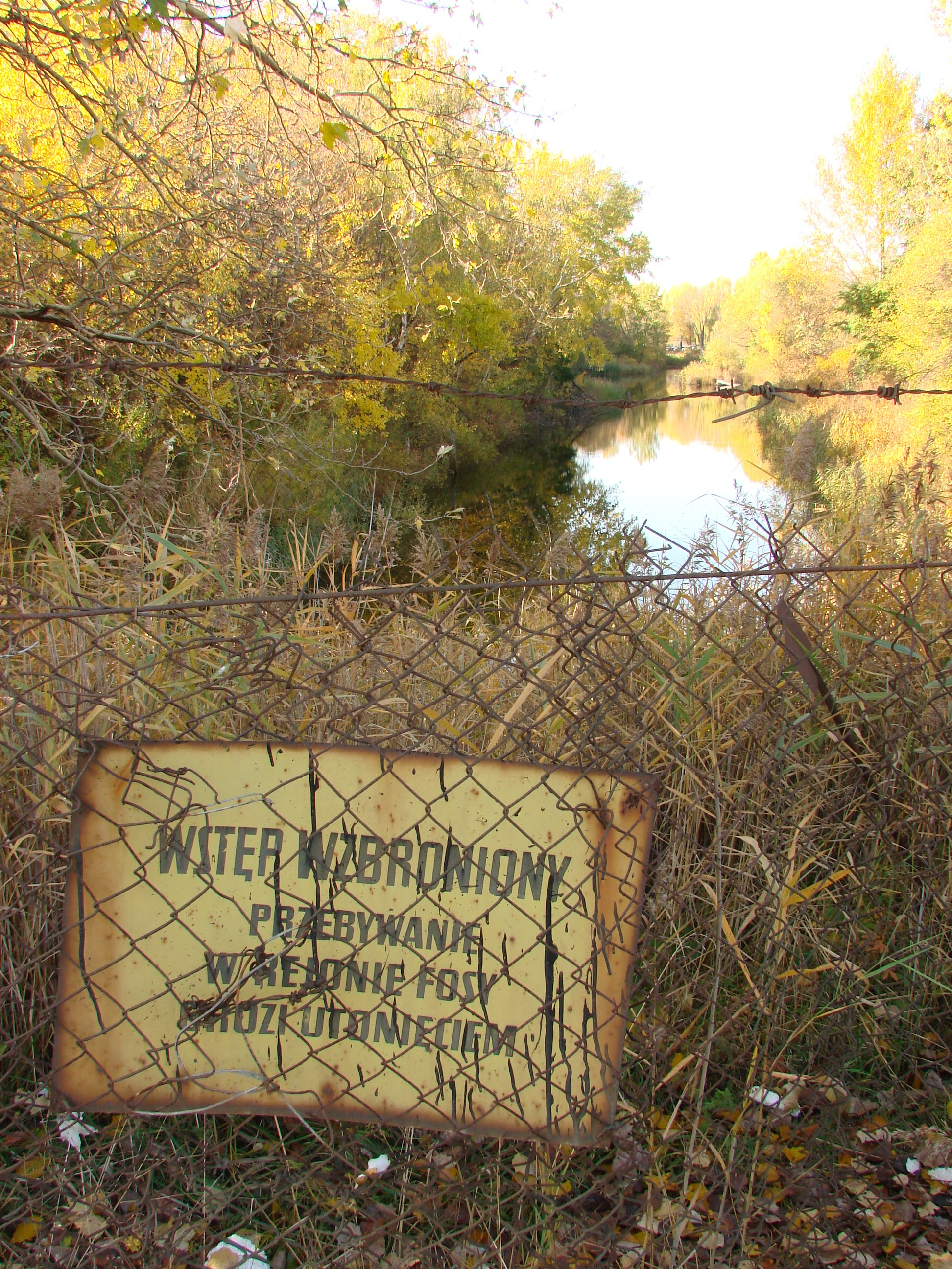 Fort Zbarż, Warszawa Okęcie. Kirys666